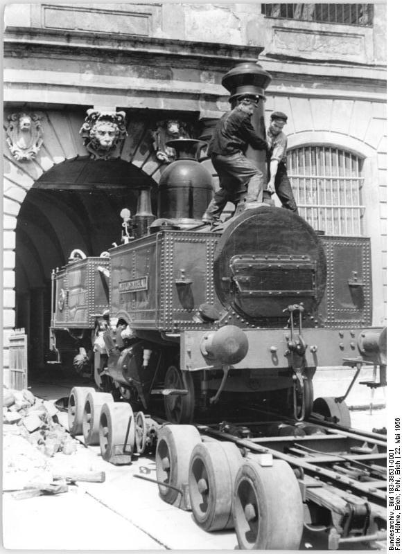 Dresden, Johanneum, Verkehrsmuseum Zentralbild Höhne-Pohl 22.5.1956 1785 A.V. Zur 750-Jahrfeier der Stadt Dresden Neues Verkehrsmuseum entsteht. Zur 750-Jahrfeier der Stadt Dresden wird im Zentrum von Dresden im Johanneum ein neues Verkehrsmuseum mit einer Ausstellung " Steifzug durch die sächsische Verkehrsgeschichte" eröffnet. Dazu kam dieser Tage die Drittälteste noch in Deutschland erhaltene Lokomotive " Muldental", die im RAW Einheit Leipzig überholt wurde, nach Dresden. Die Lokomotive wurde im Jahre 1861 in dem damaligen Chemnitz erbaut und war 91 Jahre in Betrieb. UBz: Die Lokomotive vor dem künftigen Verkehrsmuseum in Dresden.